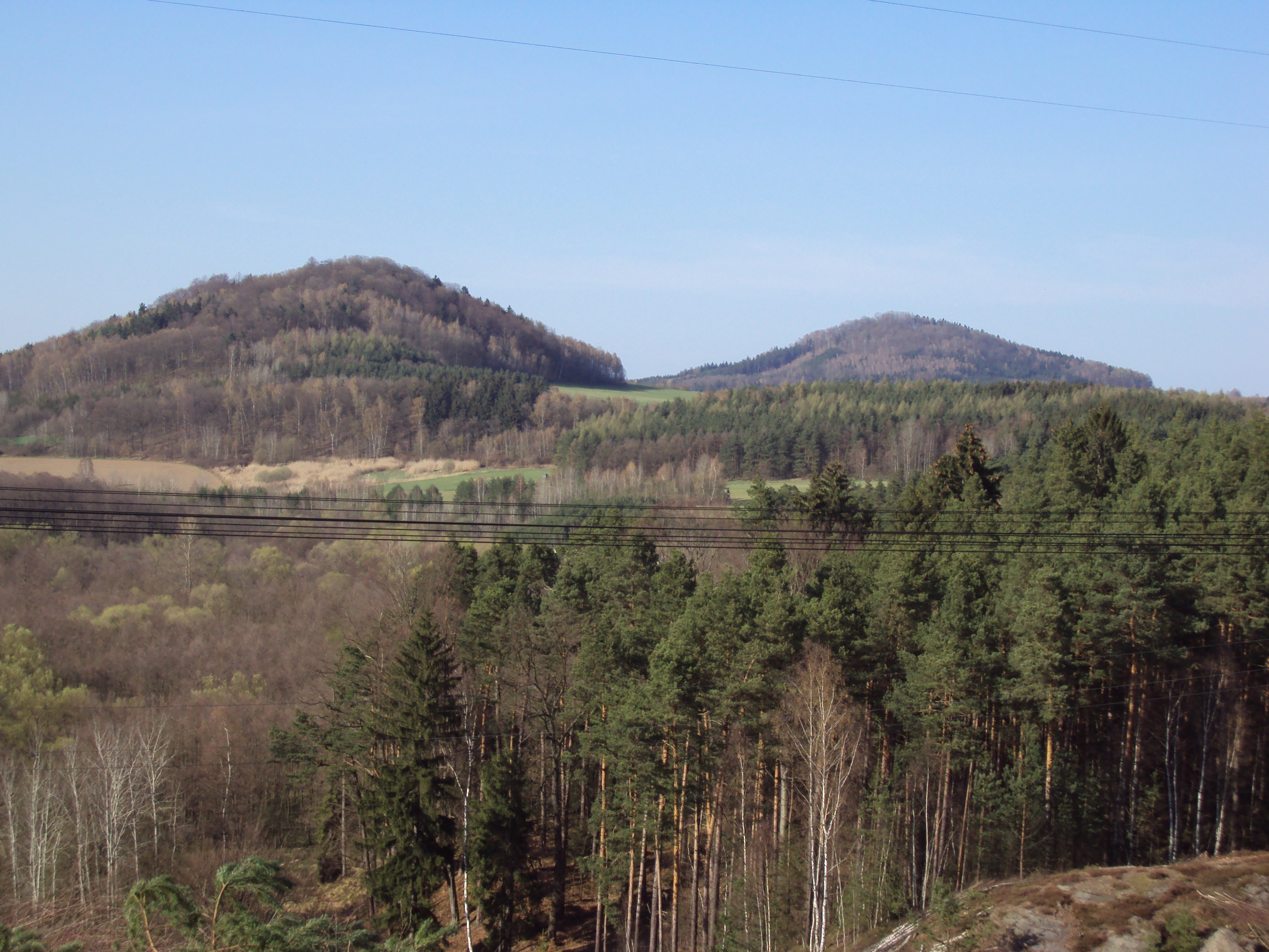 Velenický kopec vpředu, vzadu Brništský vrch, obojí Cvikovská pahorkatina z návrší u Nových Zákup